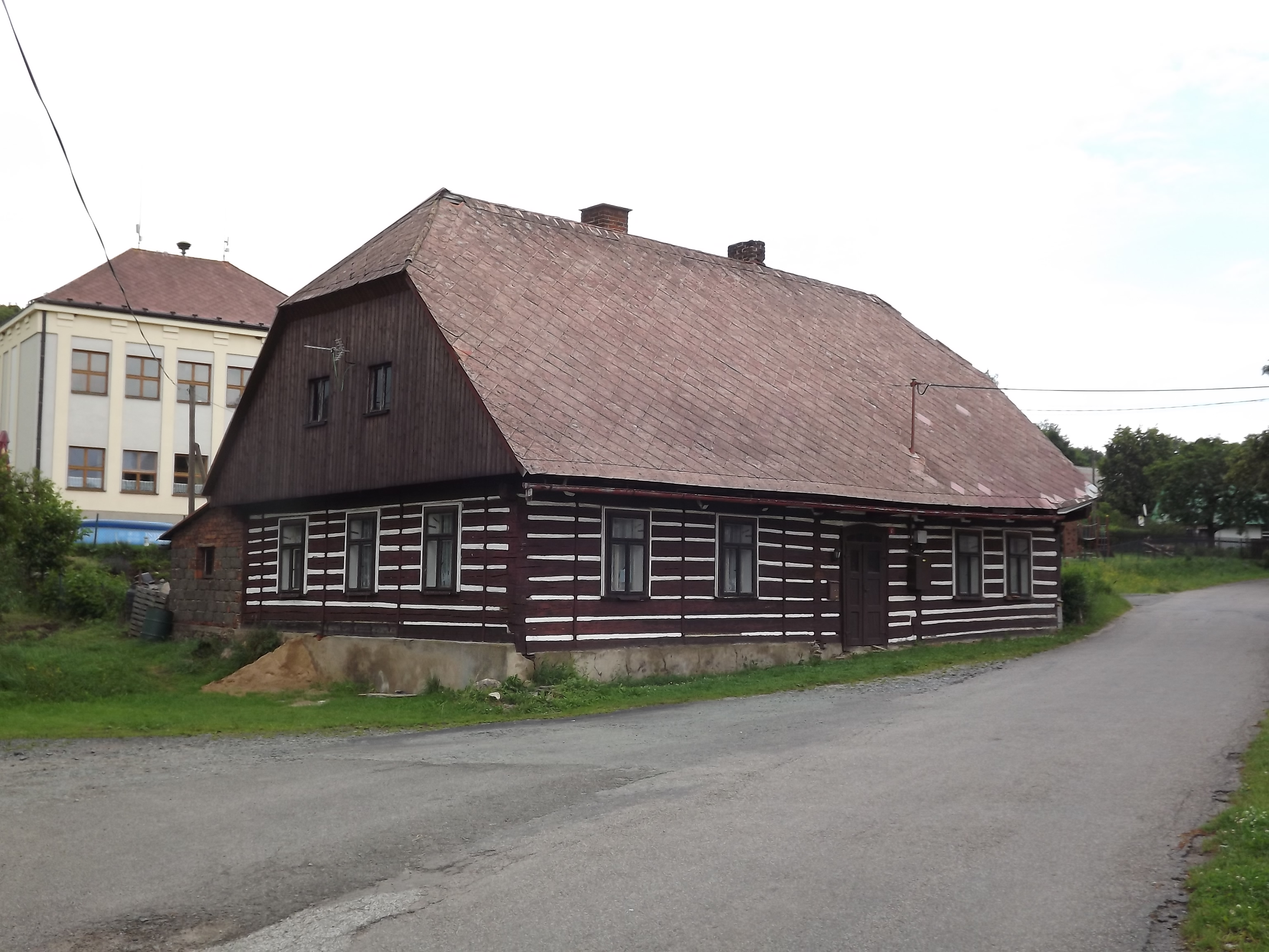 Roubenka bez kříže